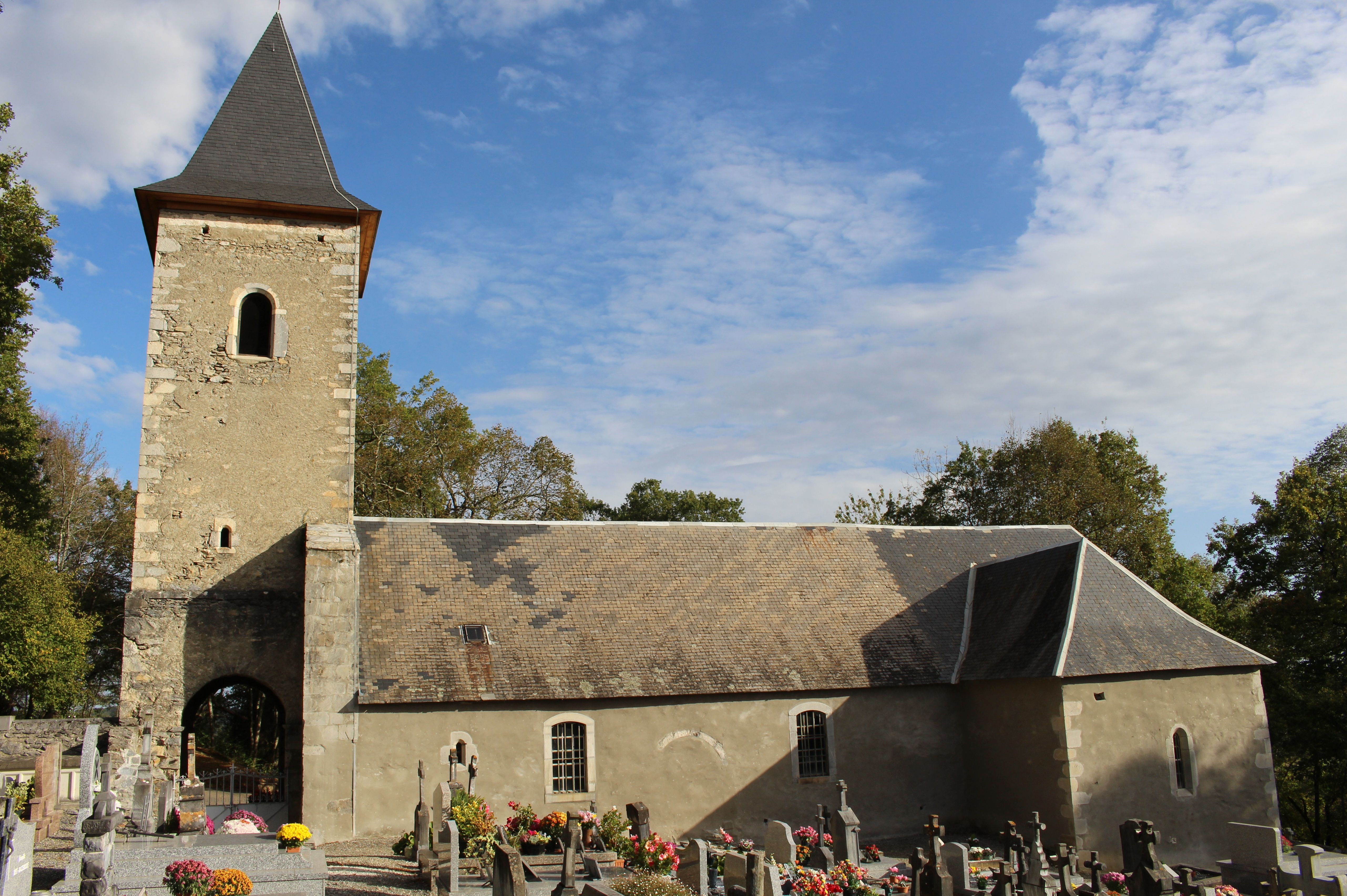 Église Notre-Dame de Montoussé (Hautes-Pyrénées)